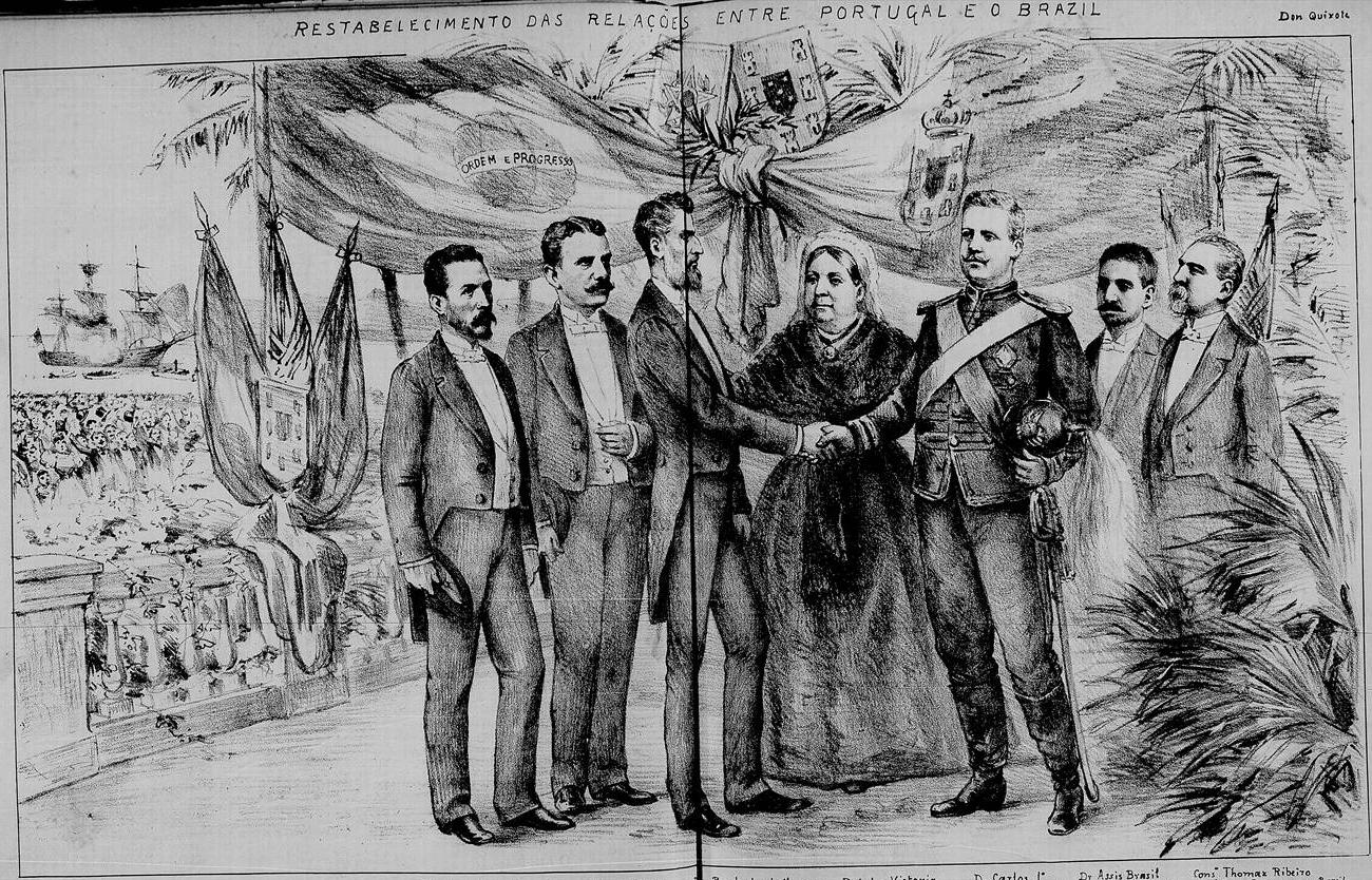 Restabelecimento das relações entre Portugal e o Brasil. Legenda: "Graças aos bons officios do governo de S. M. Britannica e às notas de cordeal afecto trocadas entre os respectivos ministros de Portugal e Brazil, foram a 16 de Março de 1895 reatadas, com honras para ambas, as relações diplomaticas entre as duas nações irmãs".